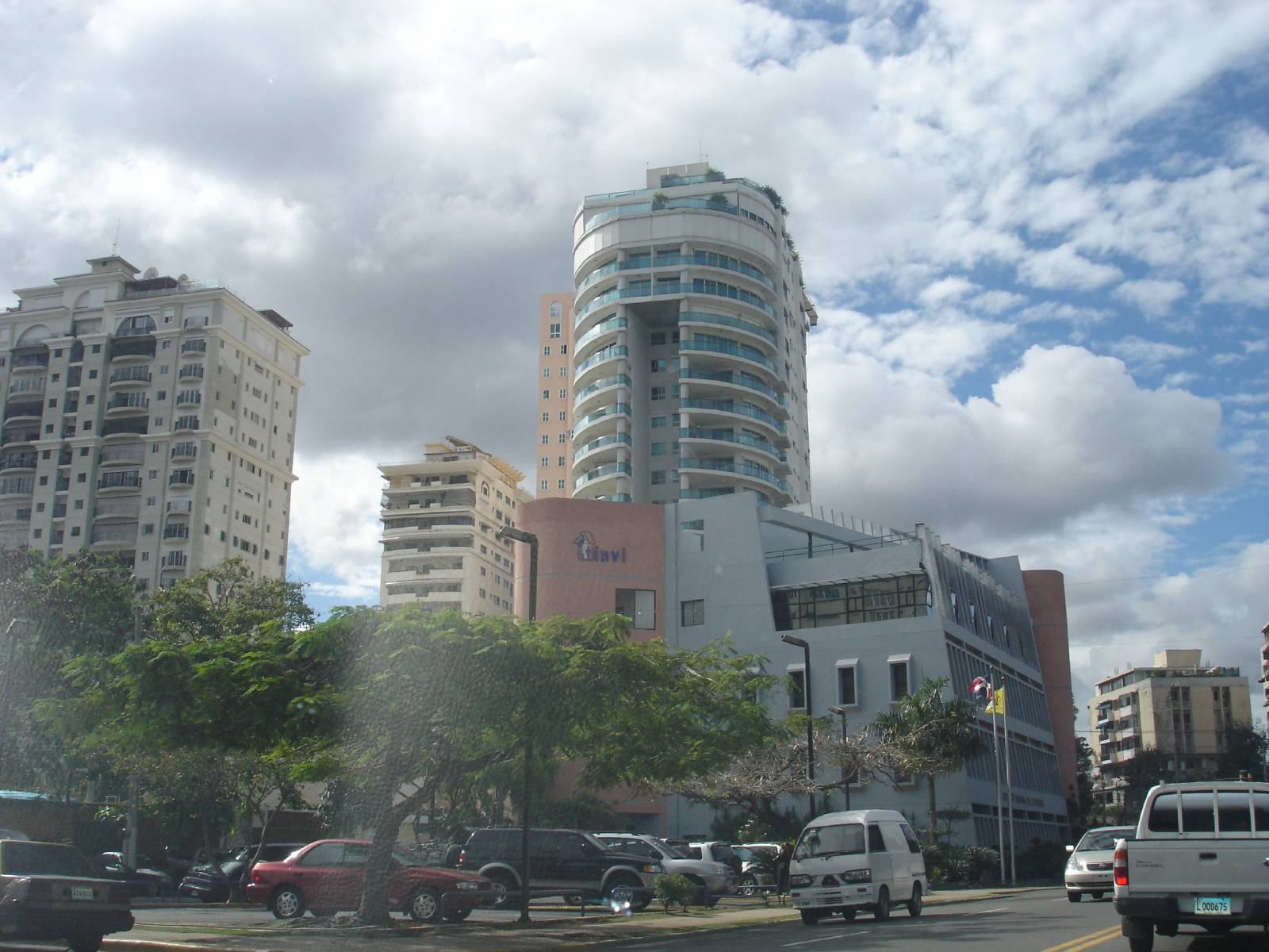 Torres en sector La Esperilla